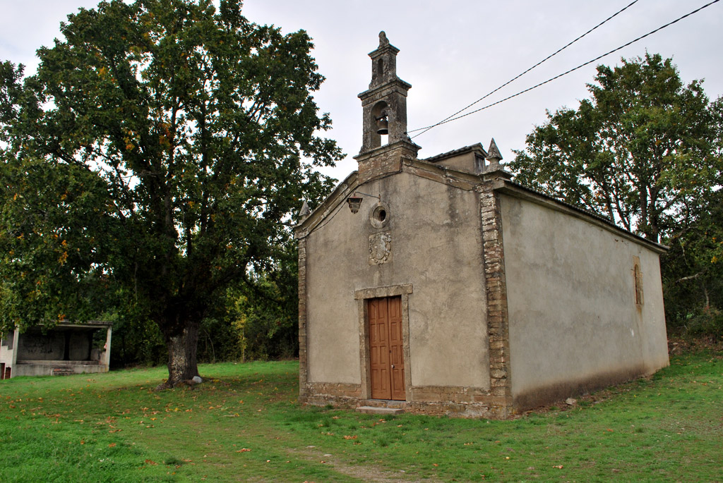 Vista da capela de San Isidro en Baamorto, Monforte de Lemos.